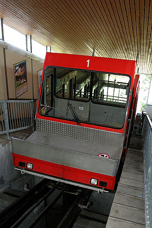 Drahtseilbahn Zug - Zugerberg